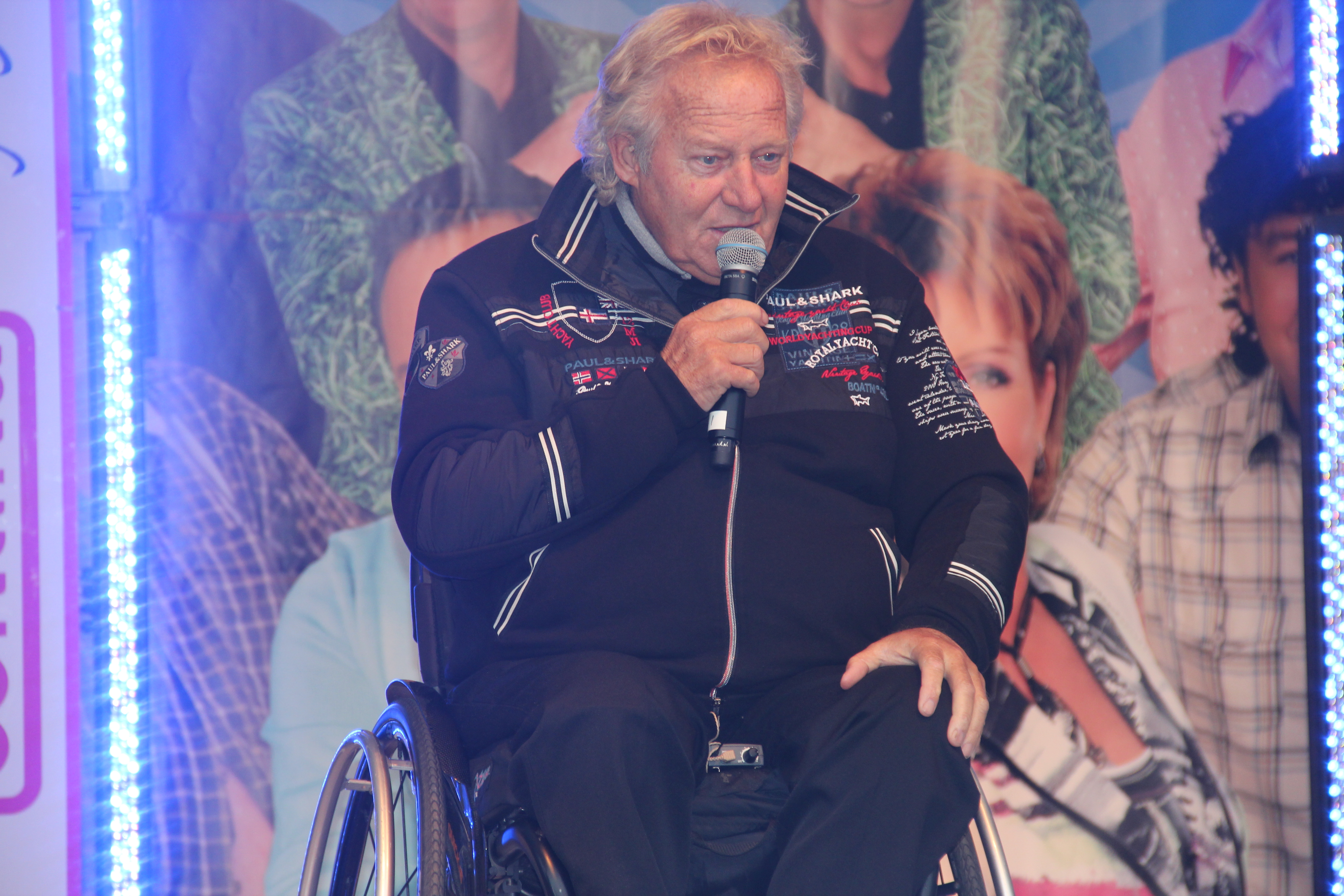 Koos Alberts tijdens een optreden bij de Gouden Pijl in Emmen 2012